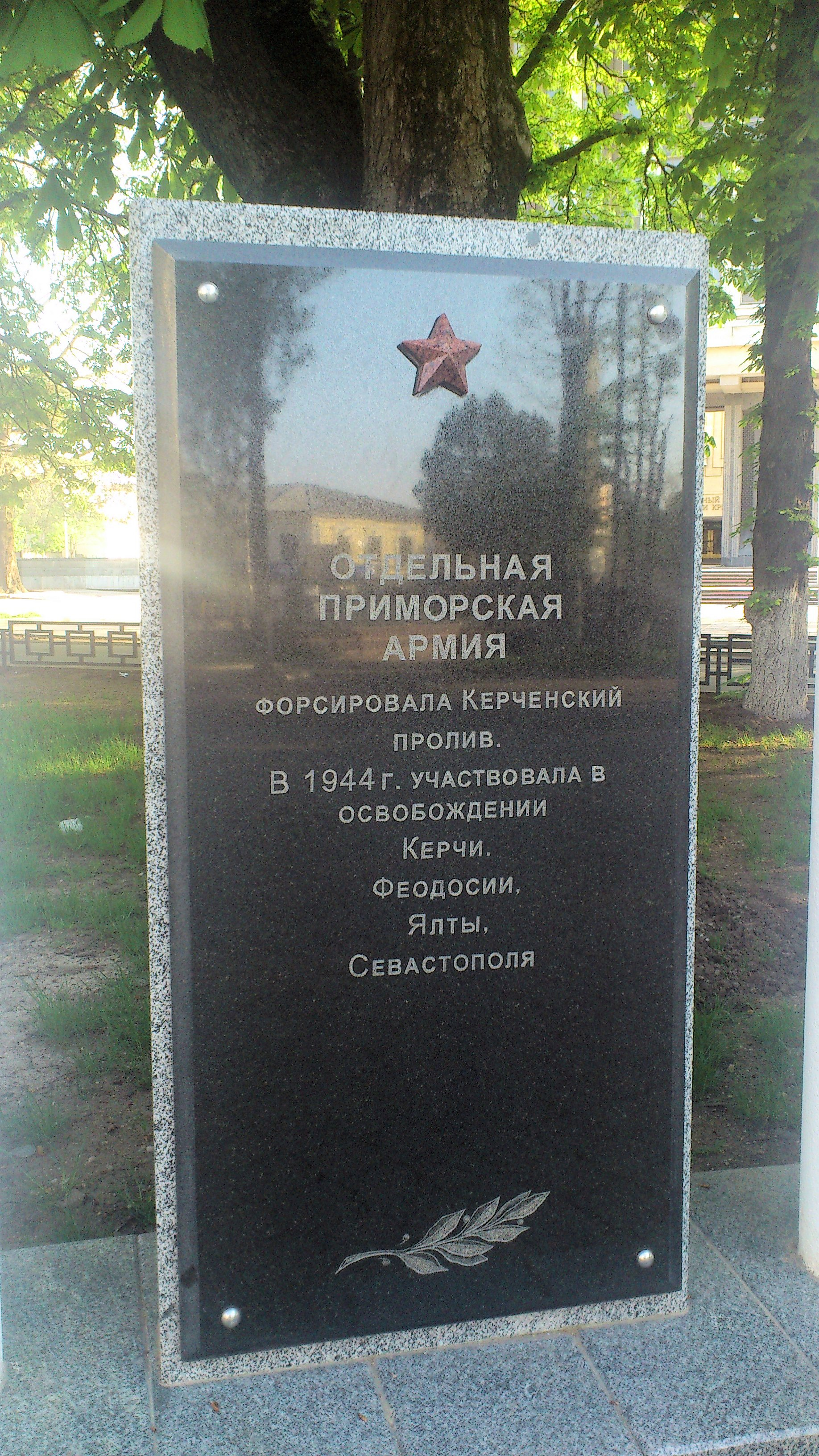 Надпись на плите: "Отдельная Приморская армия форсировала Керченский пролив. В 1944 г. участвовала в освобождении Керчи, Феодосии, Ялты, Севастополя."